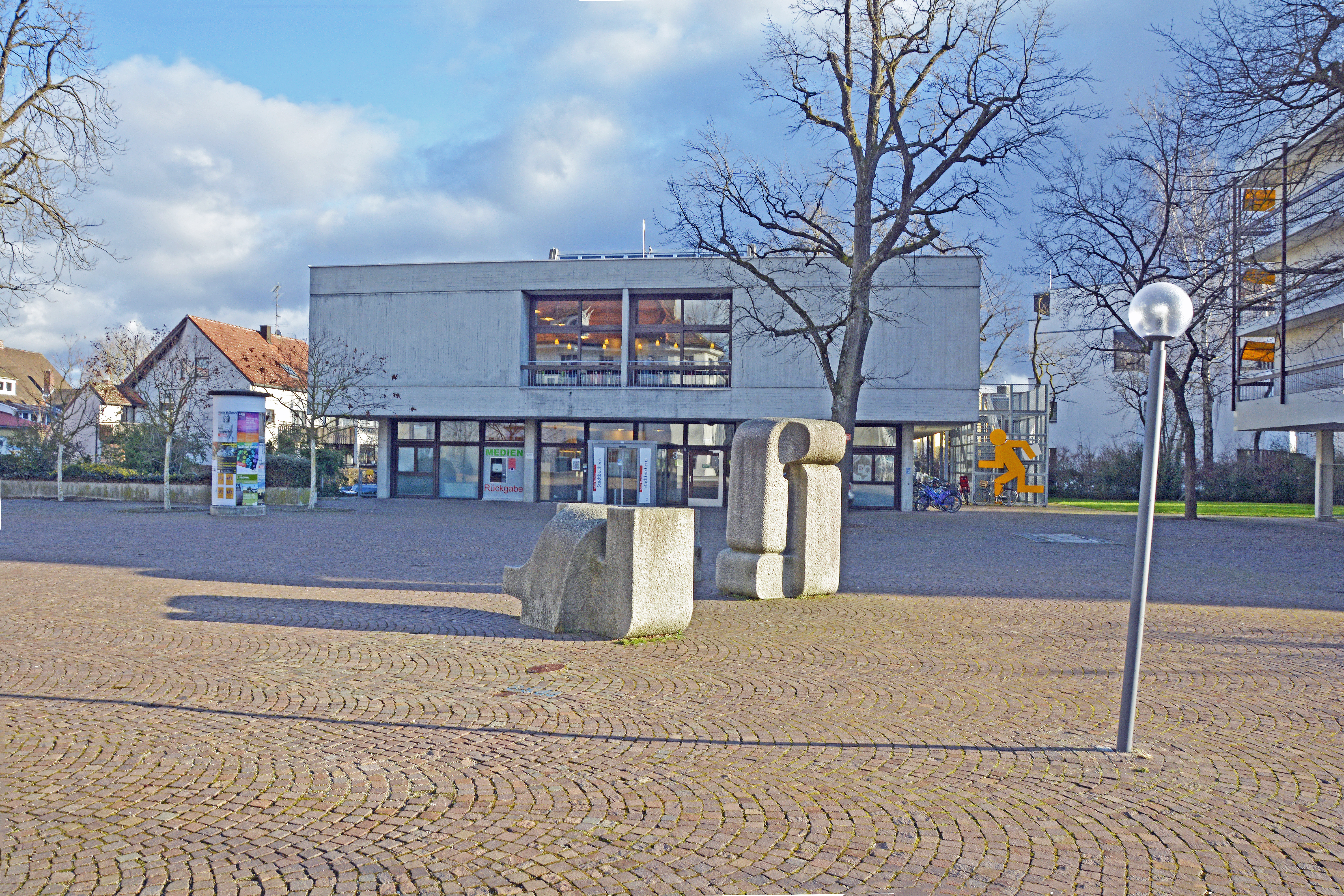 Stadtbücherei der Stadt Dachau - Hauptstelle - Max-Mannheimer-Platz 3, 85221 Dachau